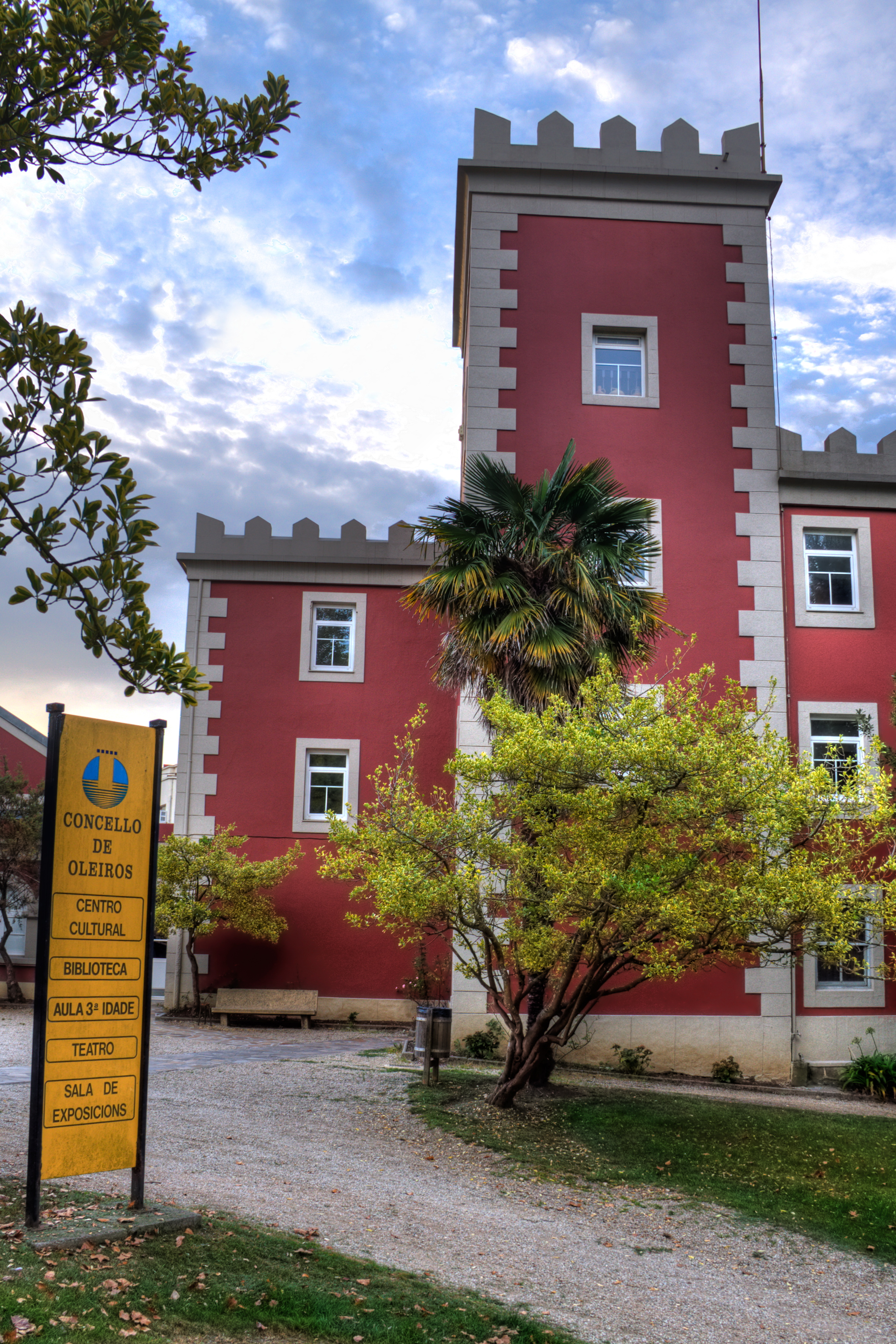 Torre de Coruxo - Santa Cruz, Oleiros (A Coruña)